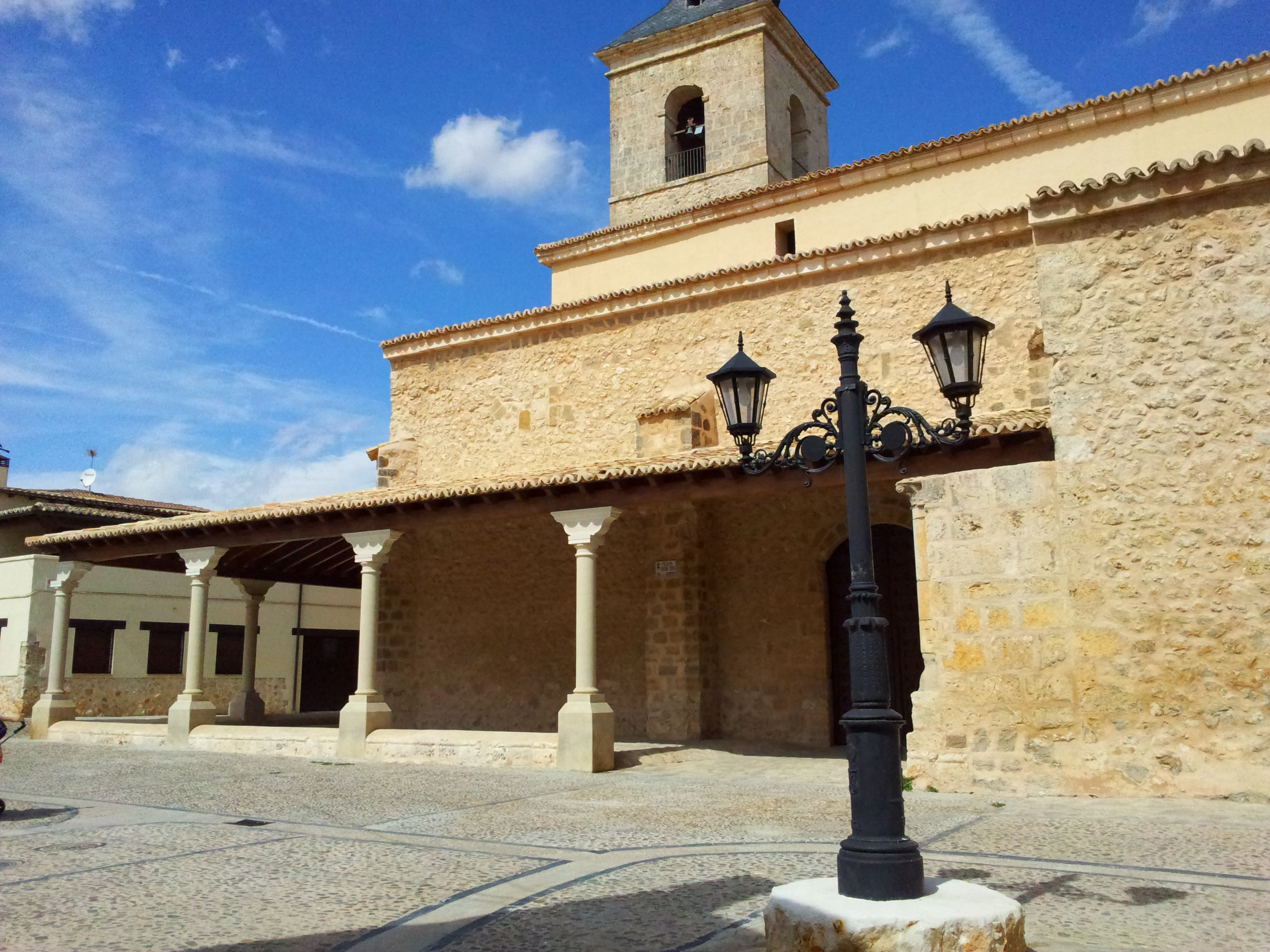 Iglesia de la Asunción de Nuestra Señora (Fuentelencina, Guadalajara, España).